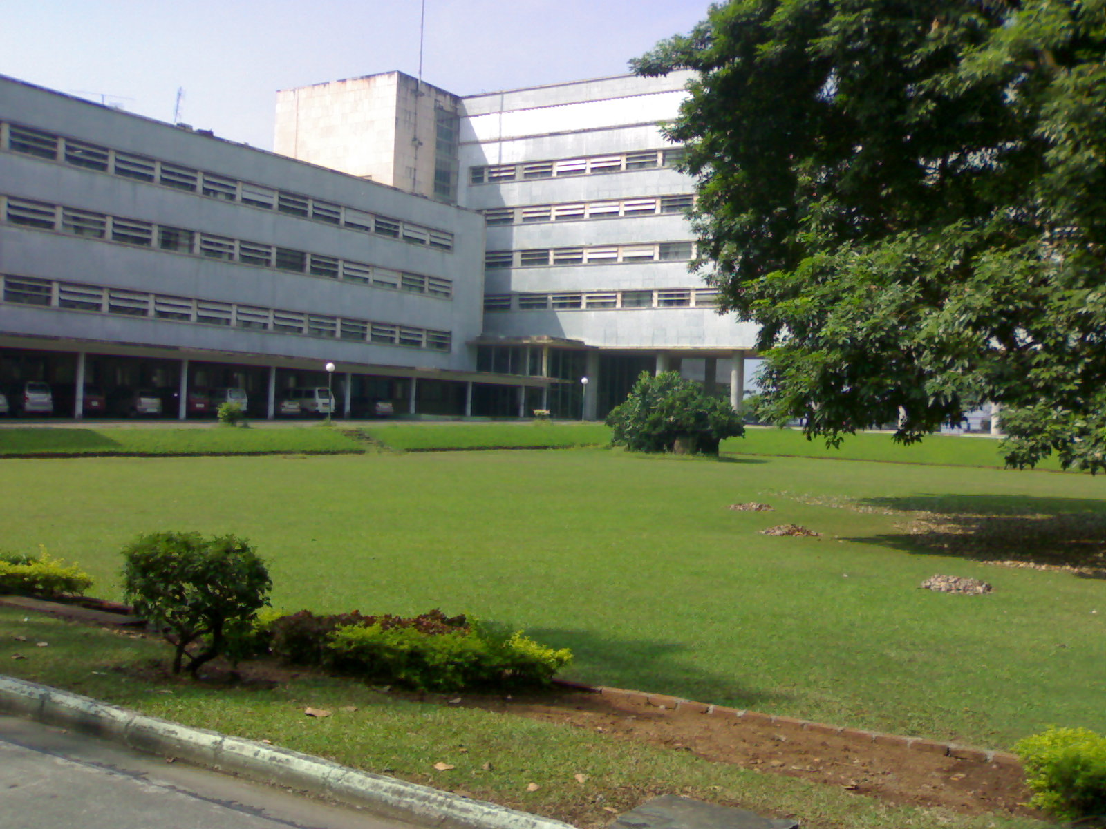 tifr picture